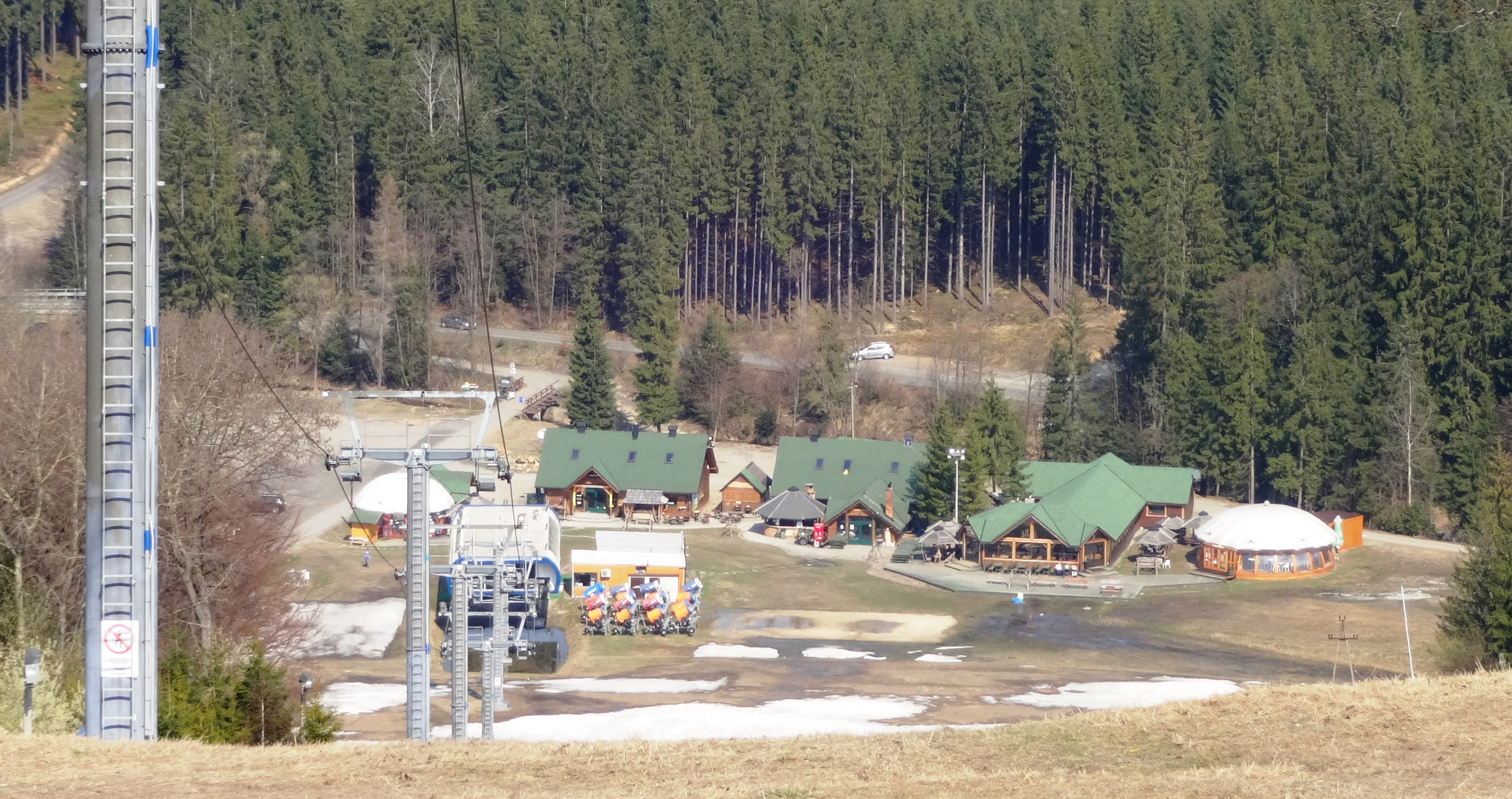 Widok na stok i dolną stację spod górnej stacji ośrodka narciarskiego Złoty Groń w Istebnej